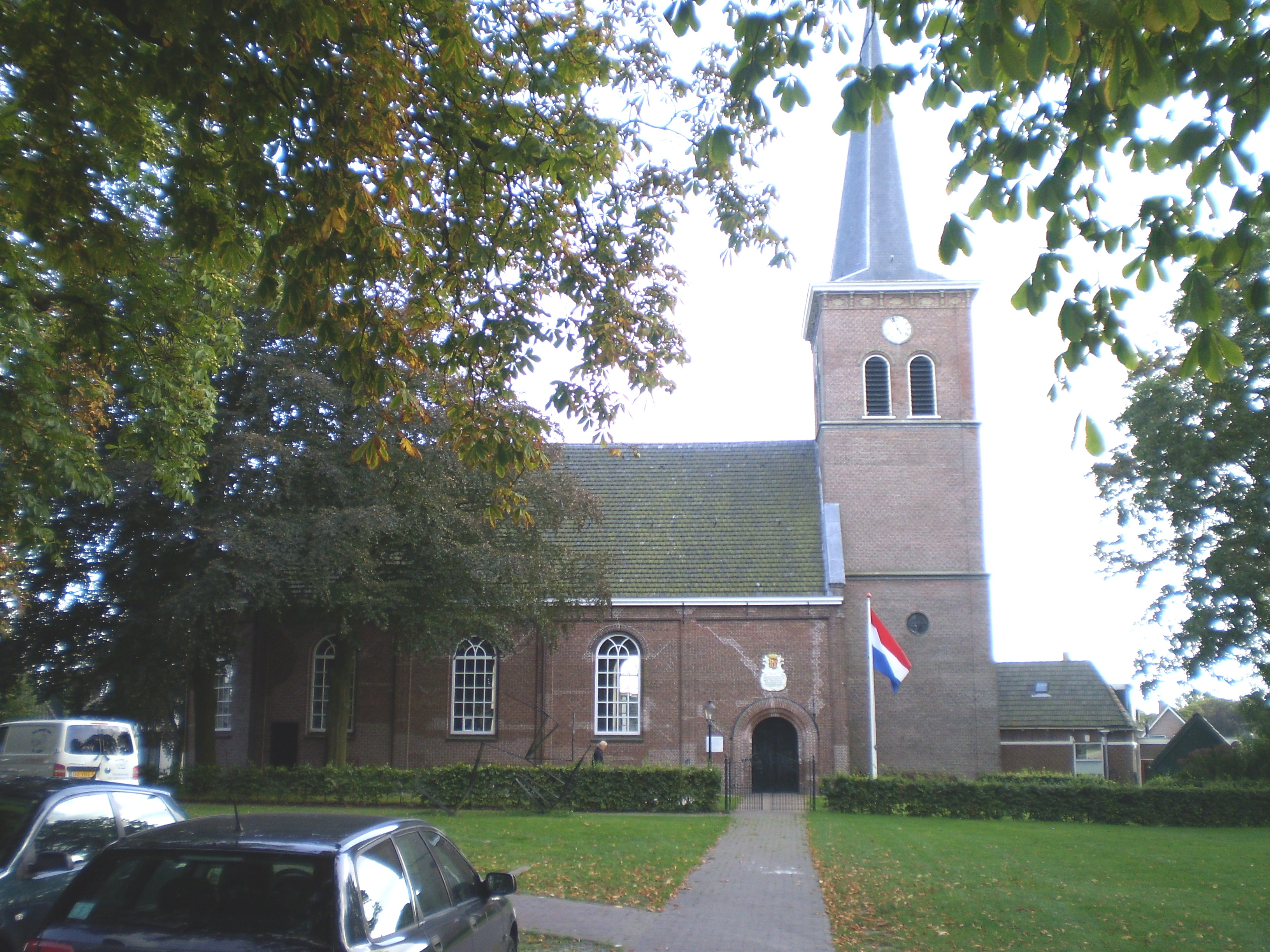 oanbean troch SK op 12 septimber 2009